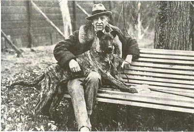 Louis Couperus en Brinio in de tuin van Van Leeuwen achter het Noordeinde in het voorjaar van 1923